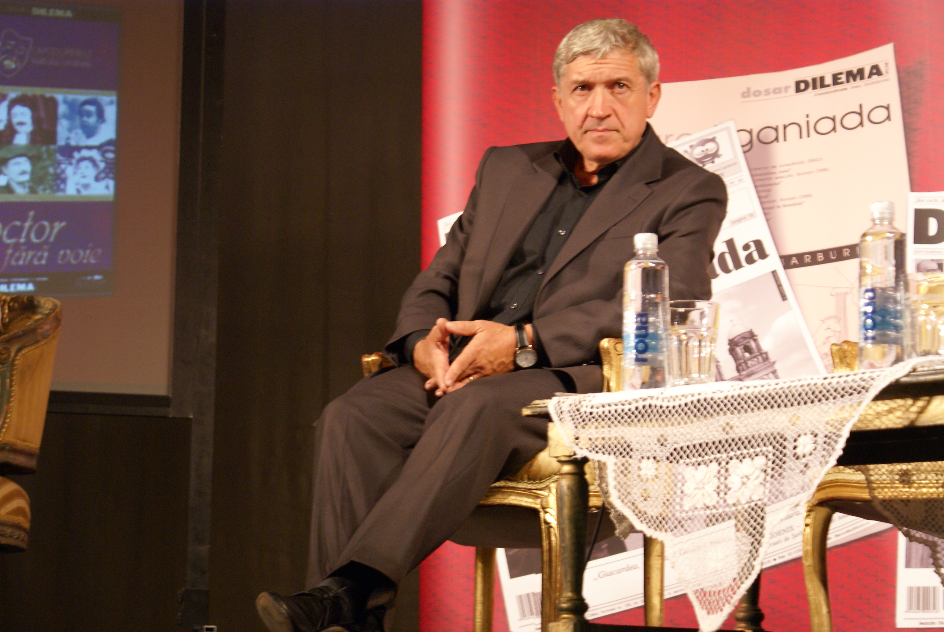 Joi, 23 septembrie 2010, la Teatrul Nottara a avut loc lansarea colecţiei de DVD-uri „Capodoperele teatrului românesc“ – Dilema Veche. Pe scenă, Mircea Diaconu.